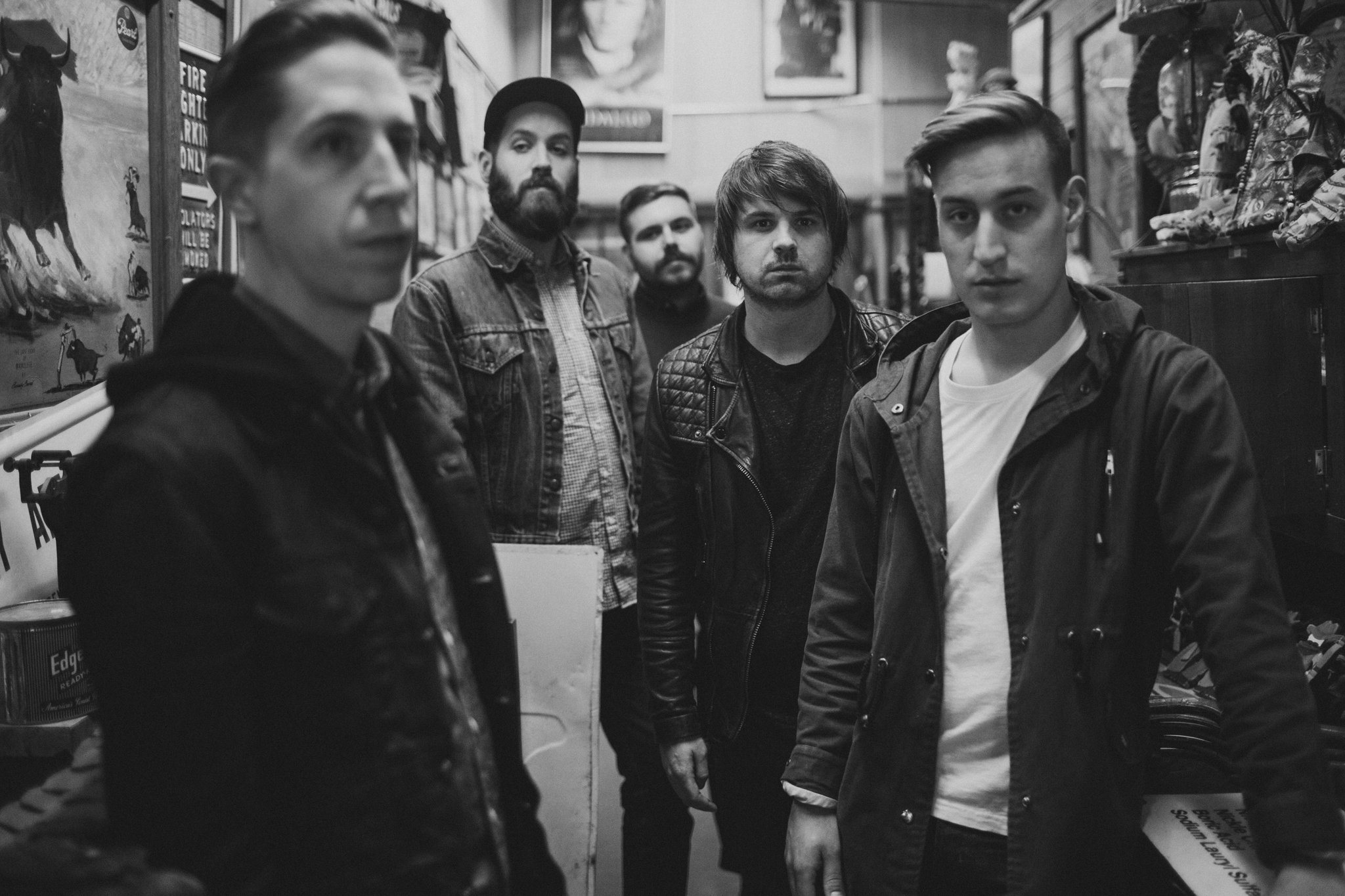 The band Silverstein in 2014